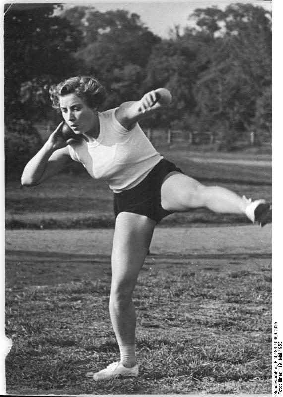 Leipzig, DHfK, Kugelstoßen Zentralbild Illner 19.5.1953 Wer studiert an der Deutschen Hochschule für Körperkultur in Leipzig? Befähigte Kinder von Arbeitern und Bauern aus allen Teilen der Deutschen Demokratischen Republik studieren an der Deutschen Hochschule für Körperkultur in Leipzig, um eines Tages als Sportlehrer und Sportmeister den demokratischen Aufbau in der DDR zu unterstützen. UBz: Im zweiten Semester studiert jetzt die Verwaltungsangestellte Elfriede Petermann aus Leipzig. Sie will sich als Diplomsportlehrerin der Sportwissenschaft widmen.